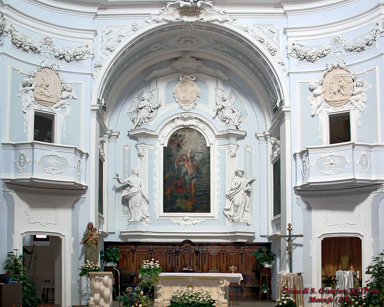 Moscufo Chiesa di S. Cristoforo, Italy